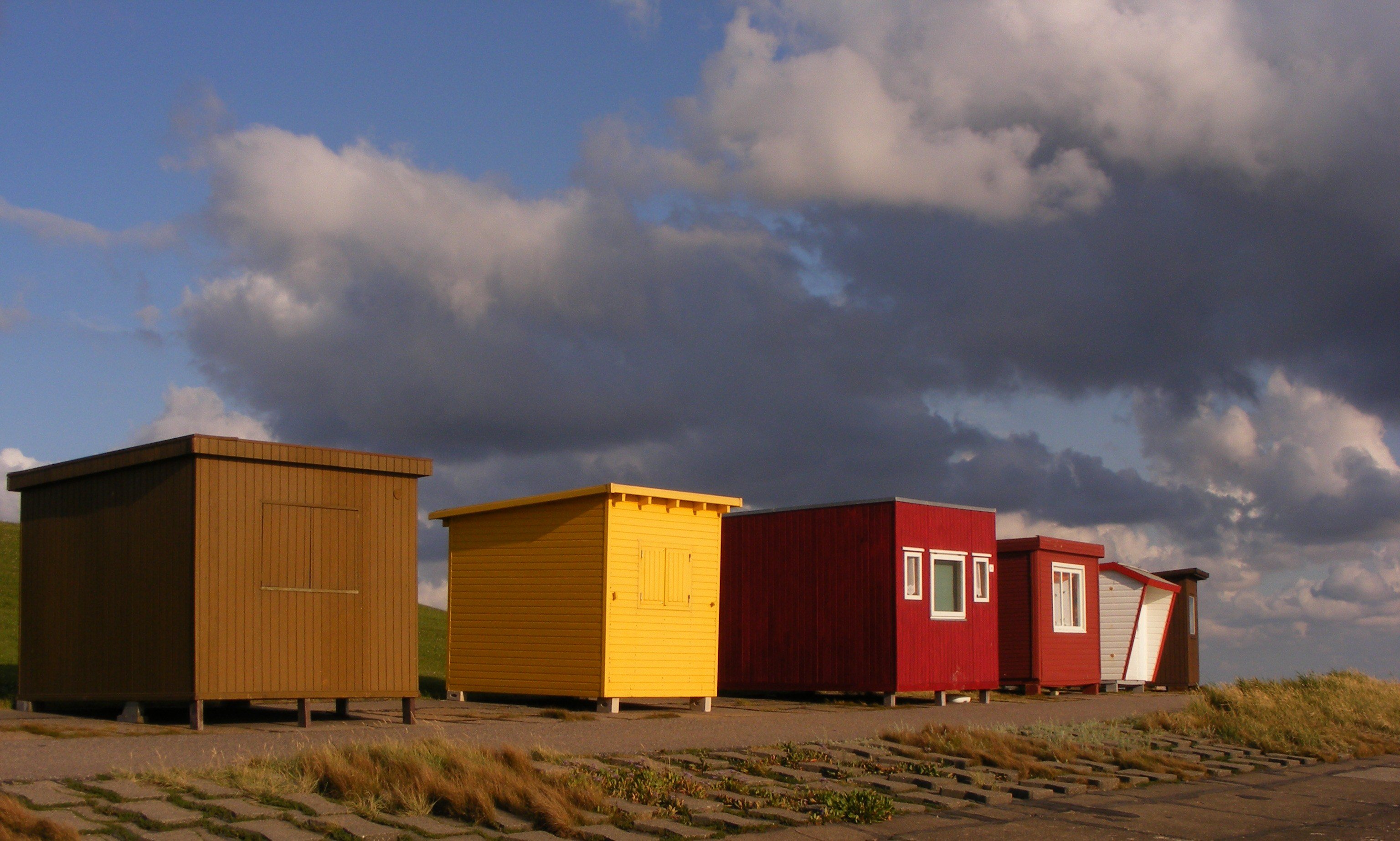 Badebuden at the Dagebuell beach